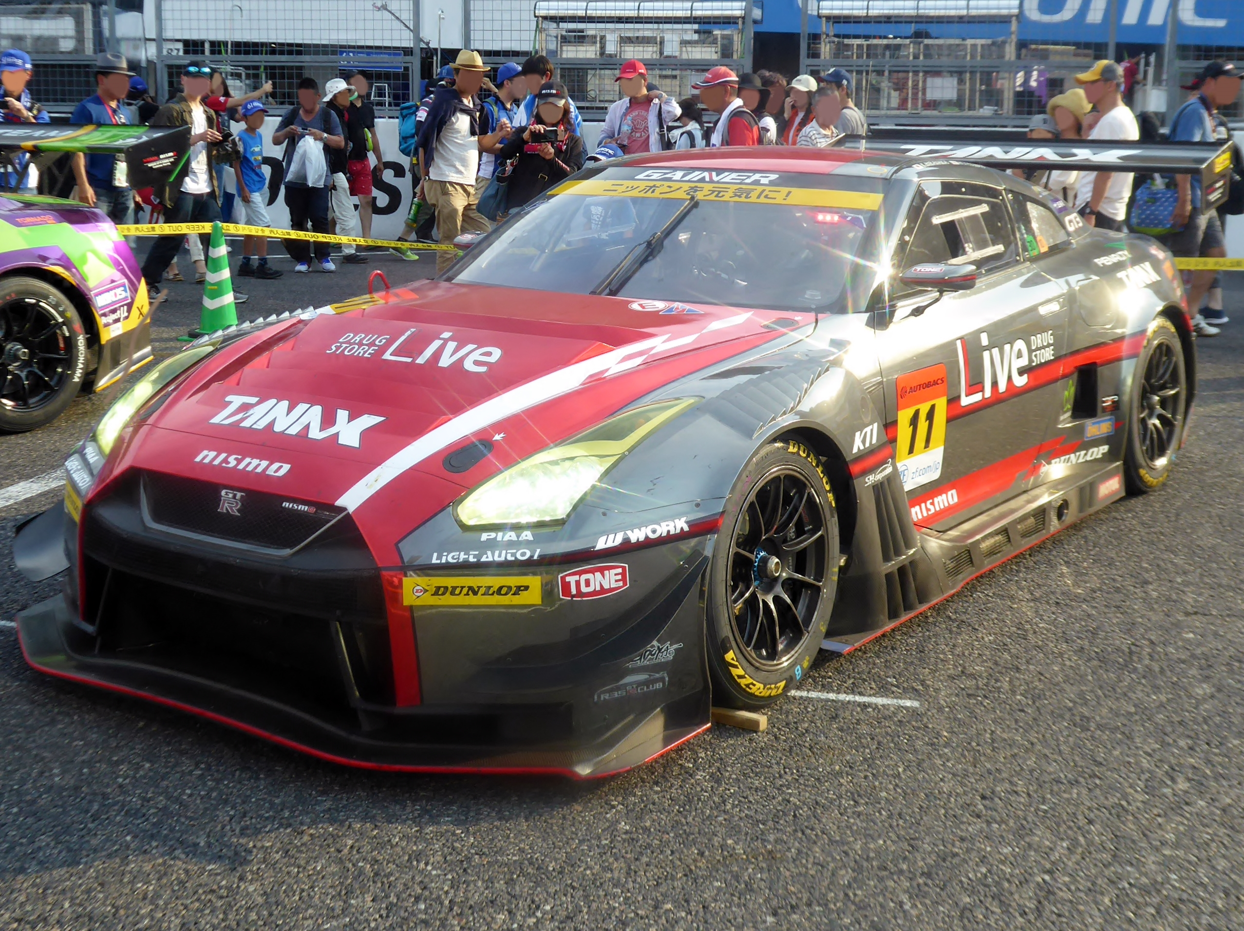 2019年鈴鹿GT300km終了後の11号車GAINER TANAX GT-Rを撮影。